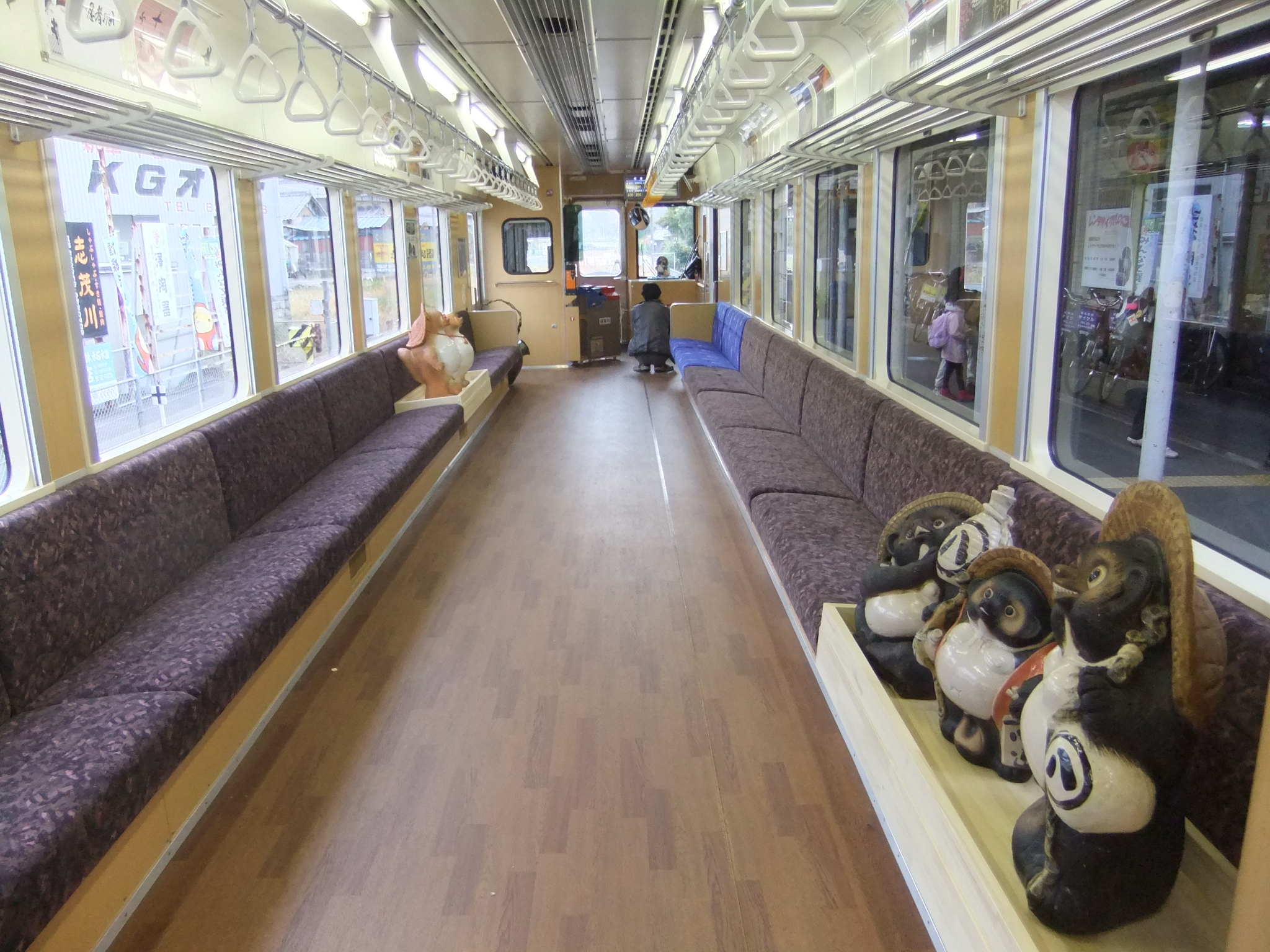 信楽高原鐡道 SKR401車内